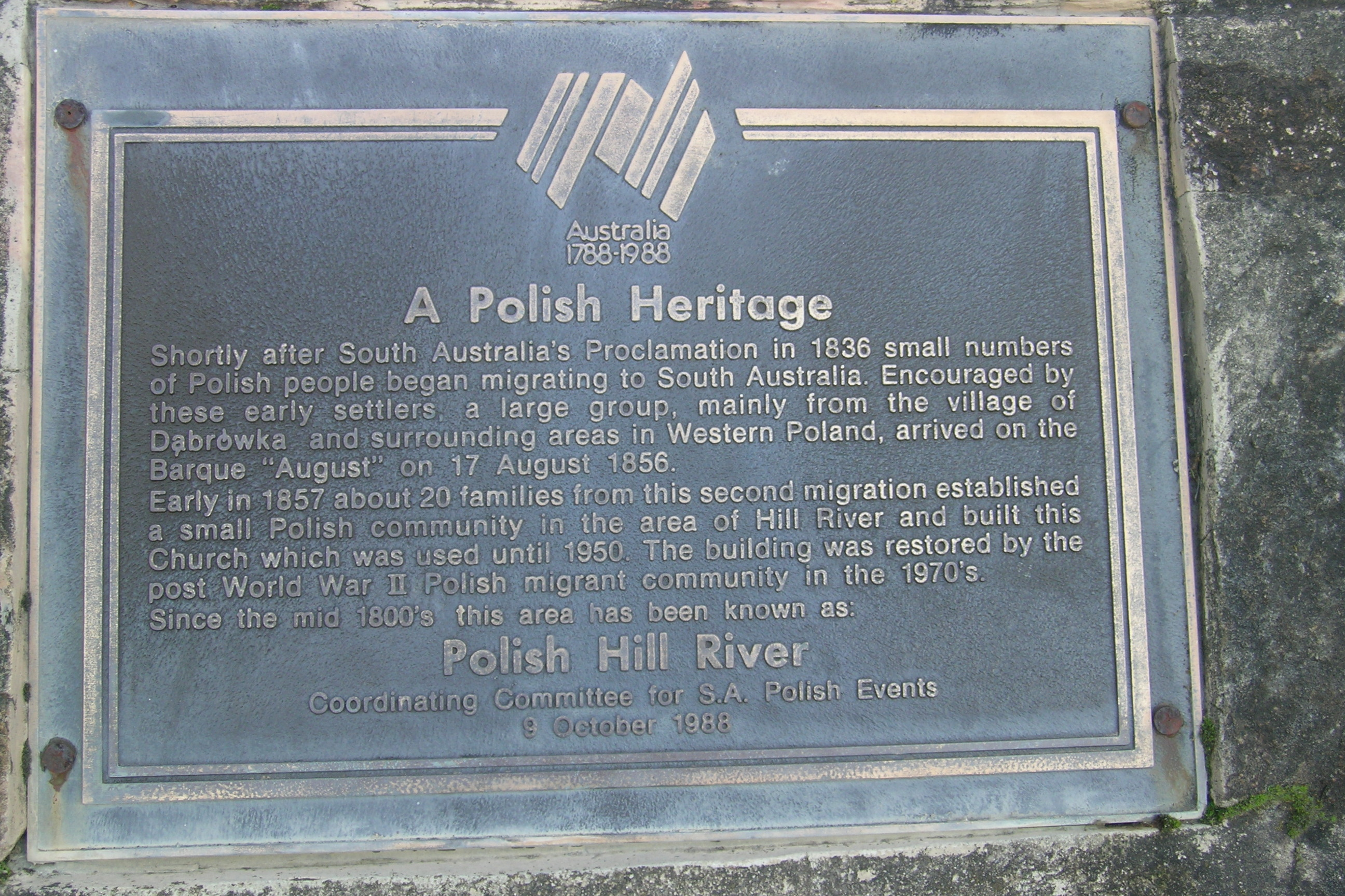 Wkrótce po powstaniu Australii Południowej w 1836 do nowego stanu przybyła grupa polskich emigrantów. Zachęceni przez pierwszych pionierów, 17 sierpnia 1856 do Australii przybyła znacznie większa grupa, pochodząca głównie z wioski Dąbrówki z zachodniej Polsce. Na początku 1857 grupa 20 rodzin osiedliła się w obszarze Hill River i zbudowała tu kościół który był używany jeszcze do 1950r. W latach 70. budynek ten został odnowiony przez emigrantów przybyłych do Australii po II wojnie światowej. Od połowy XIX wieku ten rejon jest znany jako: Polish Hill River.